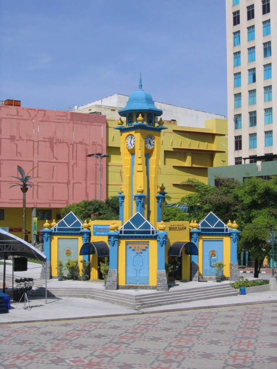 Selangor Tourist Service Centre in Shah Alam, Selangor, Malaysia.